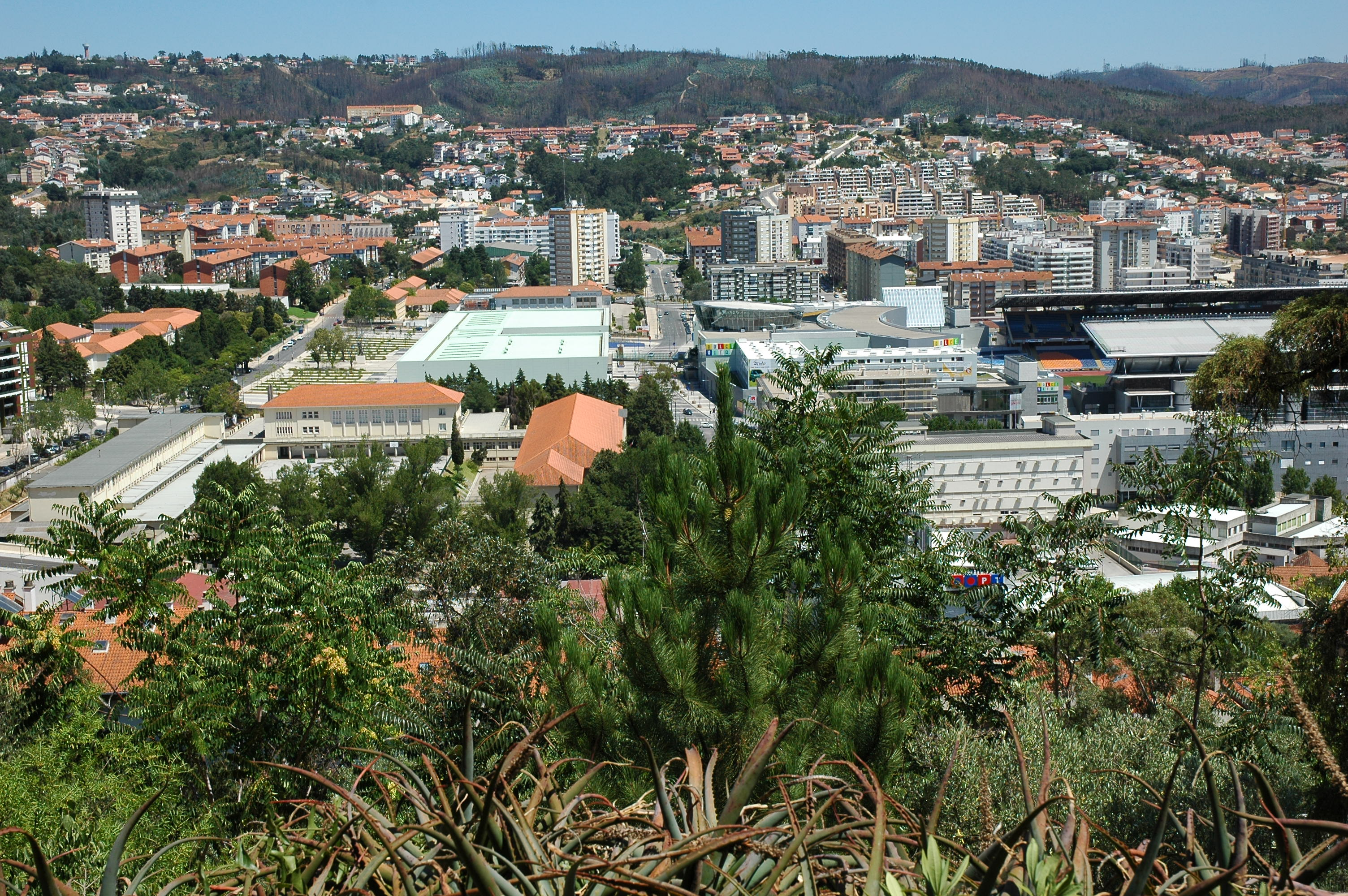 Bairro da Solum, Coimbra, Portugal